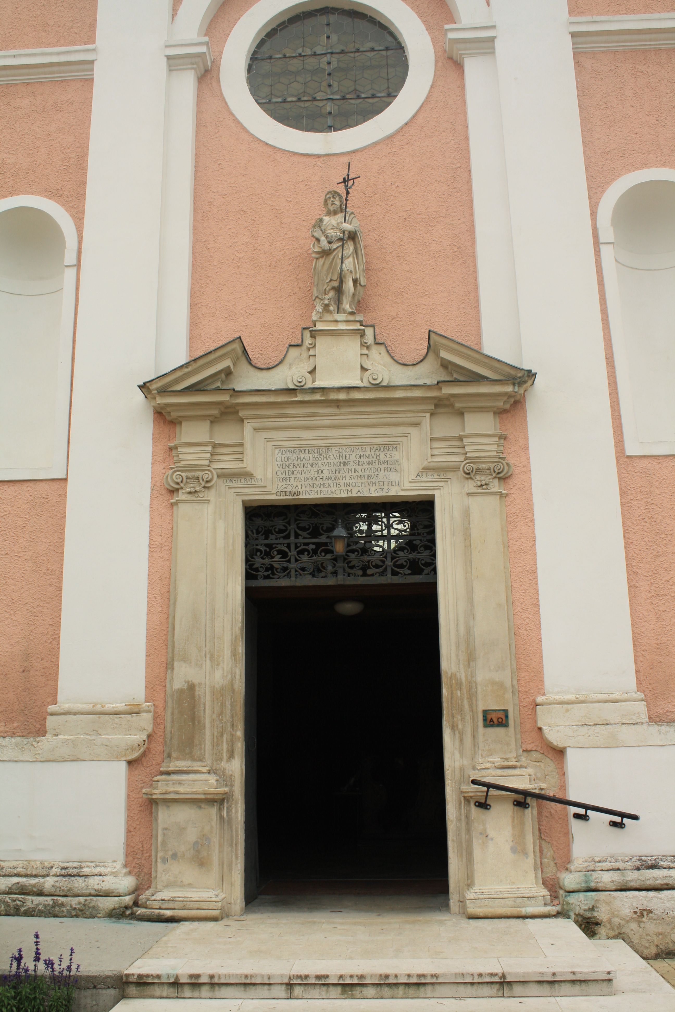 Pfarrkirche von Poysdorf